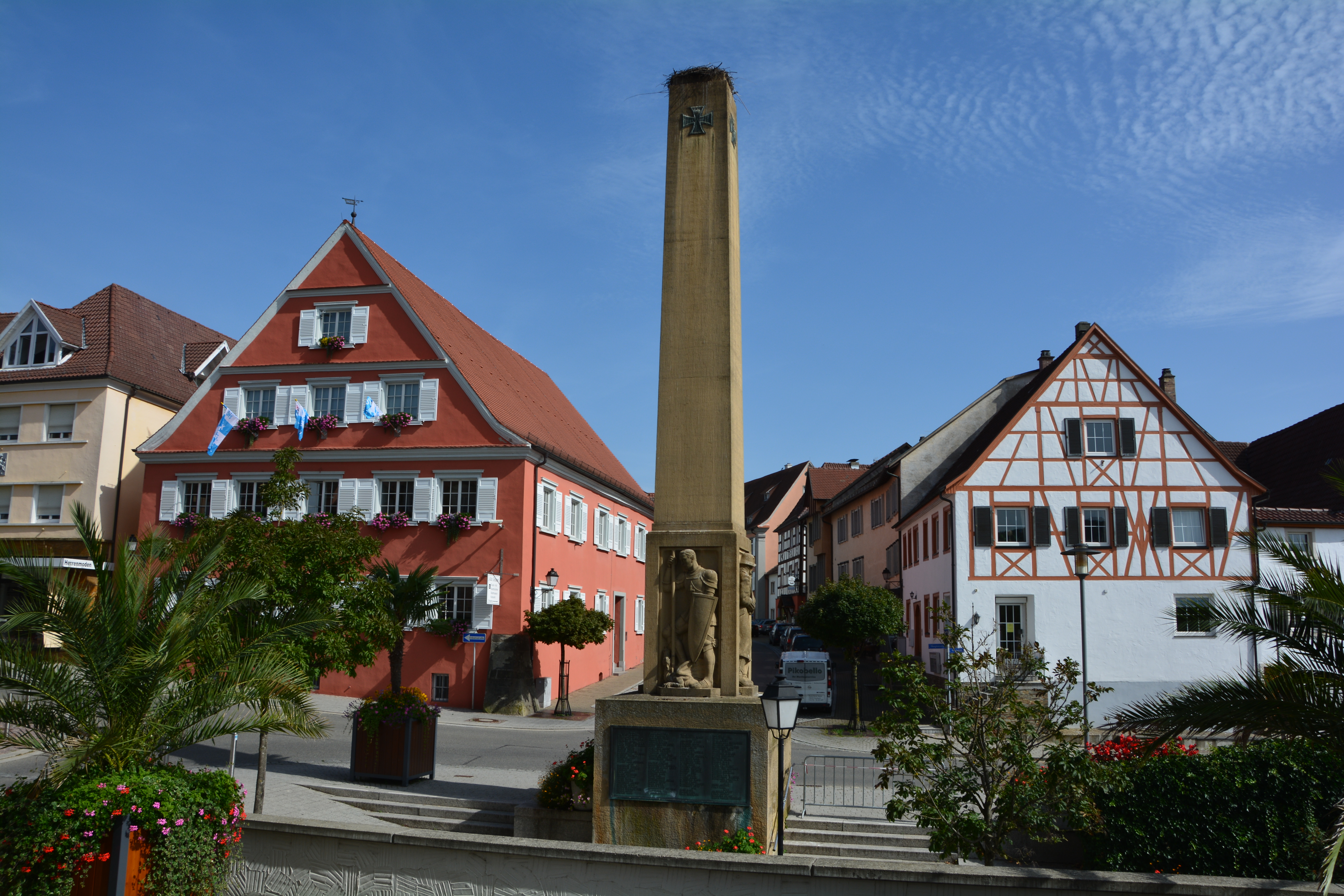 Stockach, Kirche St. Oswald, Mahn- und Kriegerdenkmal